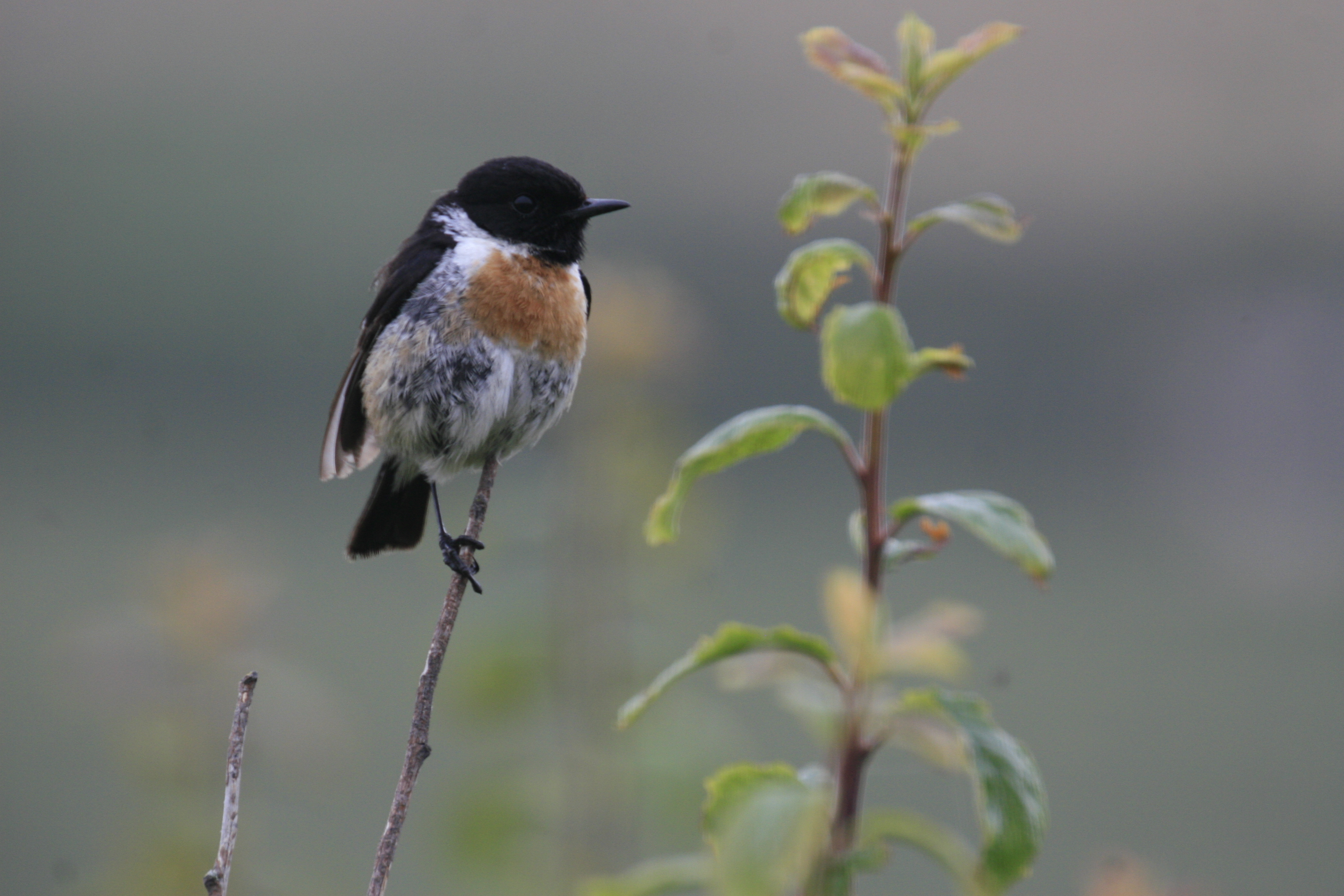 Saxicola rubicola